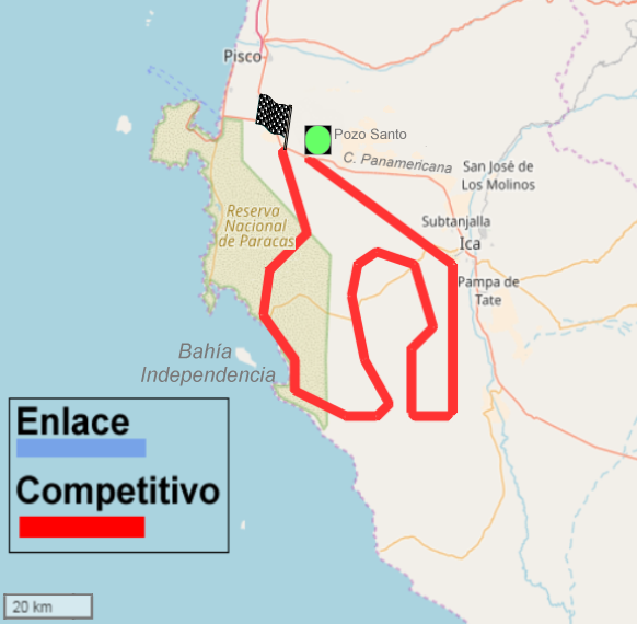 Dakar Rally 2018. Mapa de Etapa 2. Pisco-Pisco. This map of Perú was created from OpenStreetMap project data, collected by the community. This map may be incomplete, and may contain errors. Don't rely solely on it for navigation.